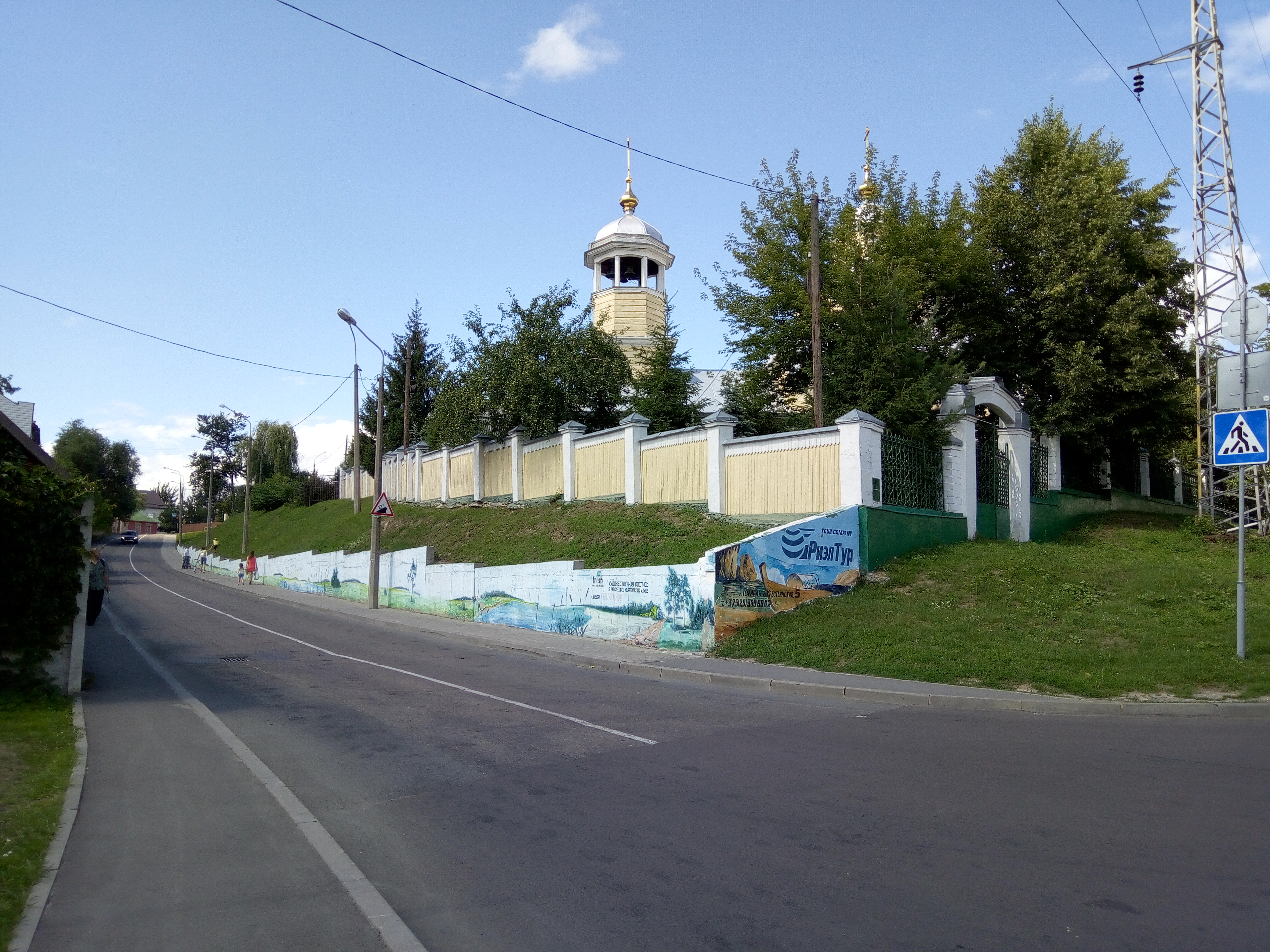 Ільінскі спуск у Гомелі, 2018 г.